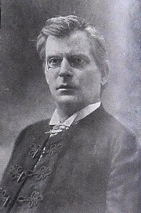 spisovatel František Sokol-Tůma (1855-1925)